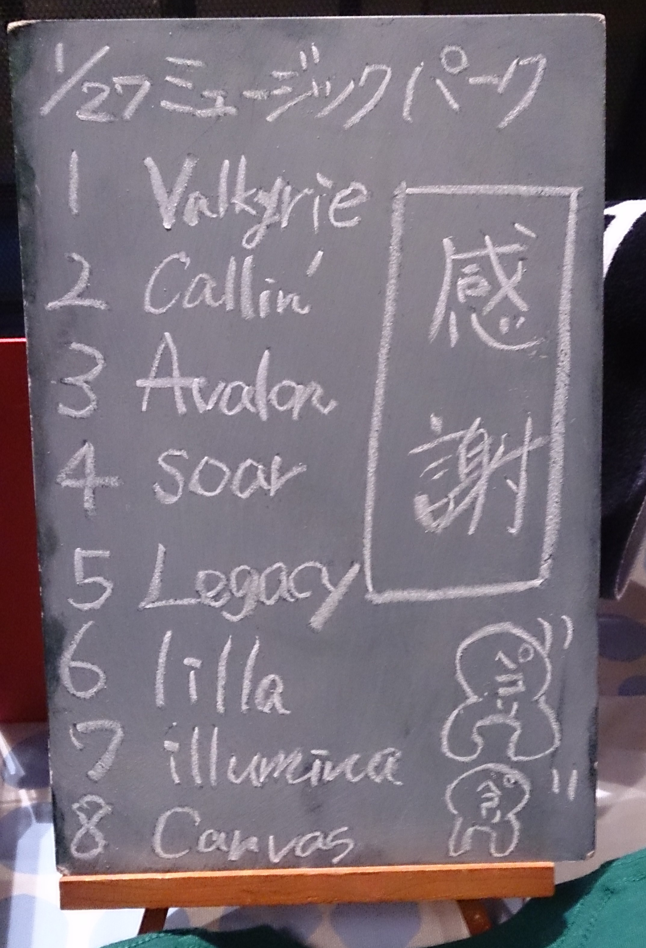 amiinAセトリボード(20180127(2))